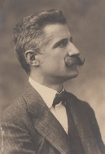 Camillo Antona Traversi